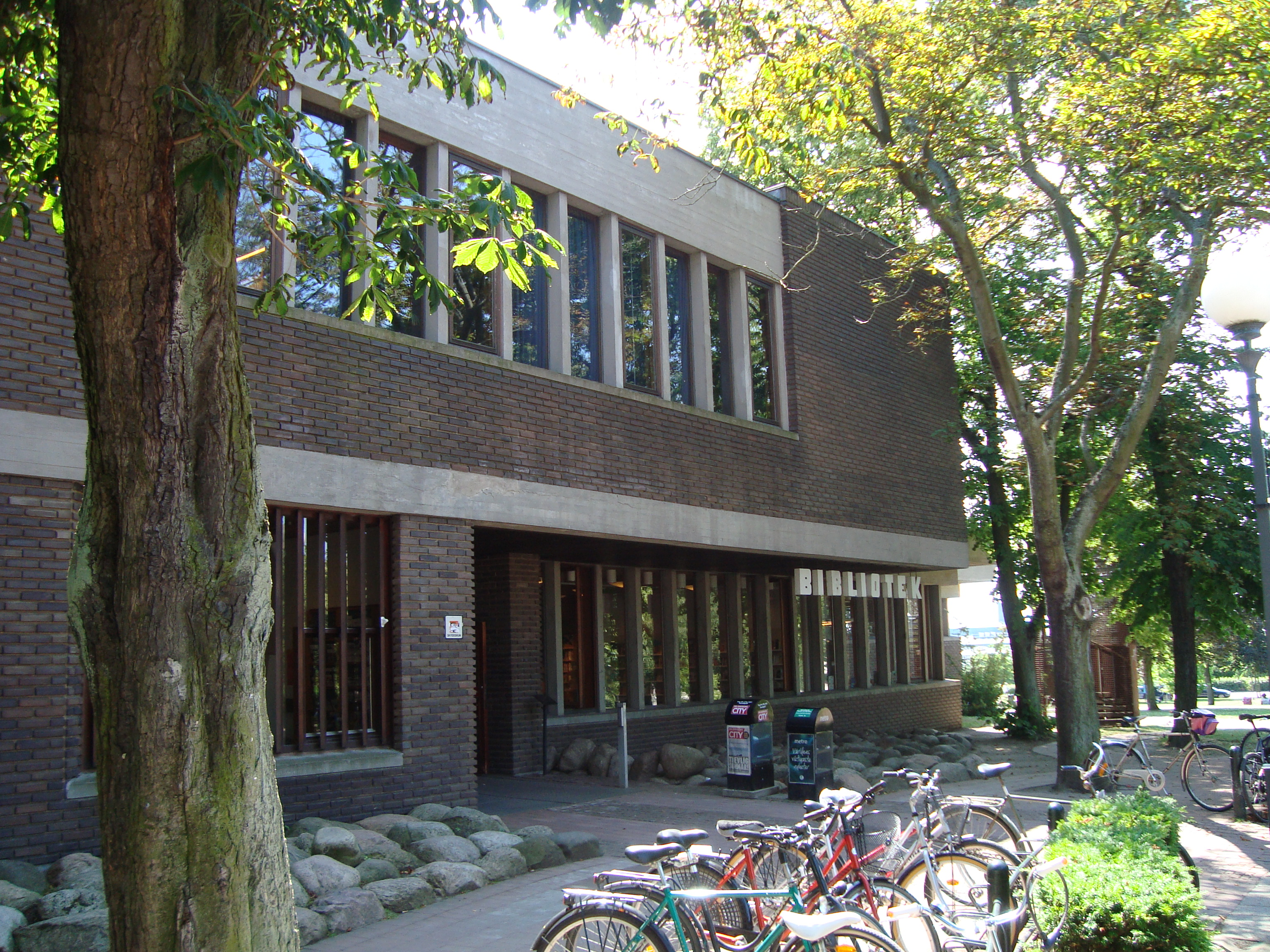 Entrén till Stadsbiblioteket i Helsingborg.